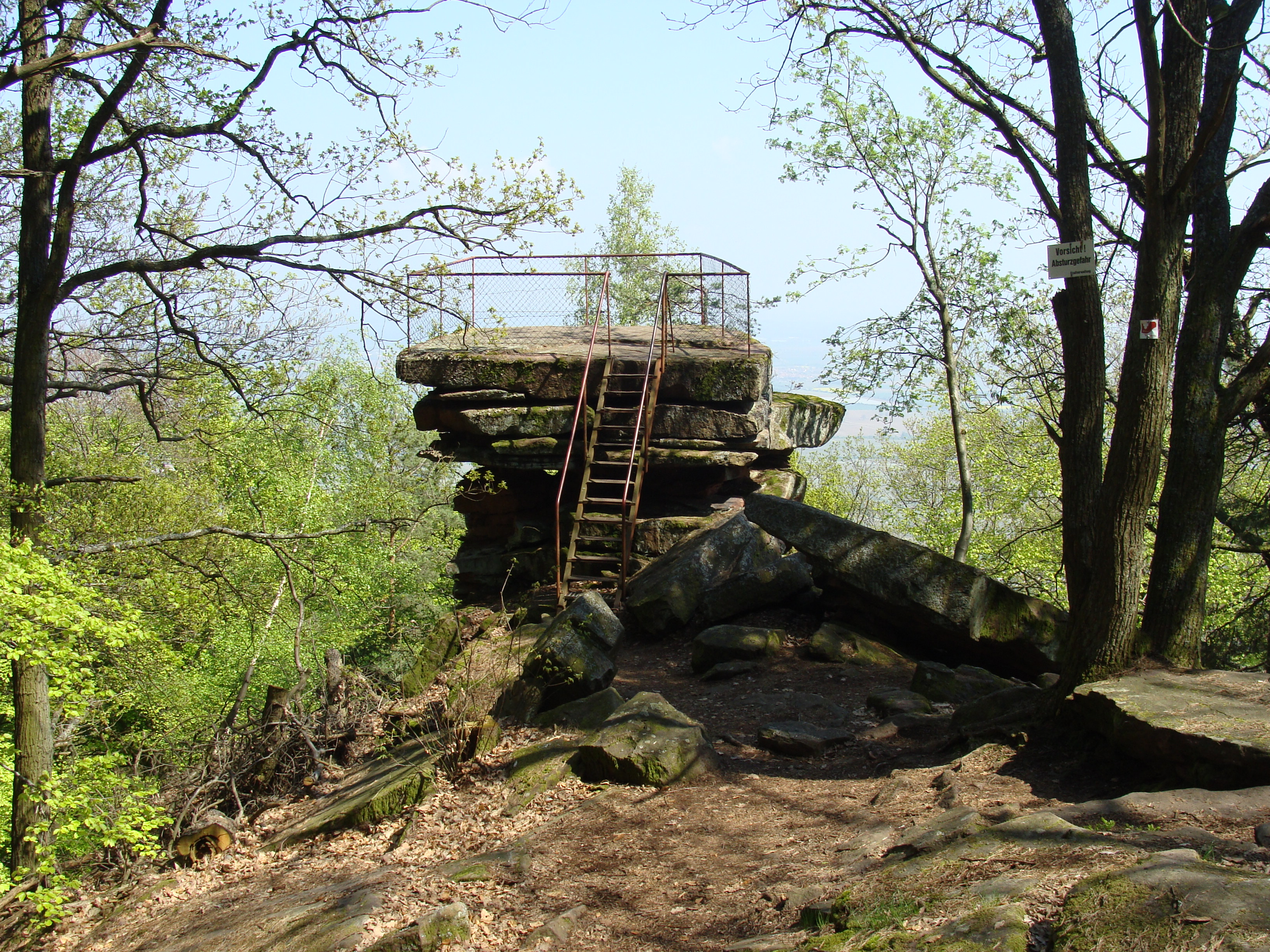 Bergstein (Hohe Loog) im Pfälzerwald - Naturdenkmal in Rheinland-Pfalz